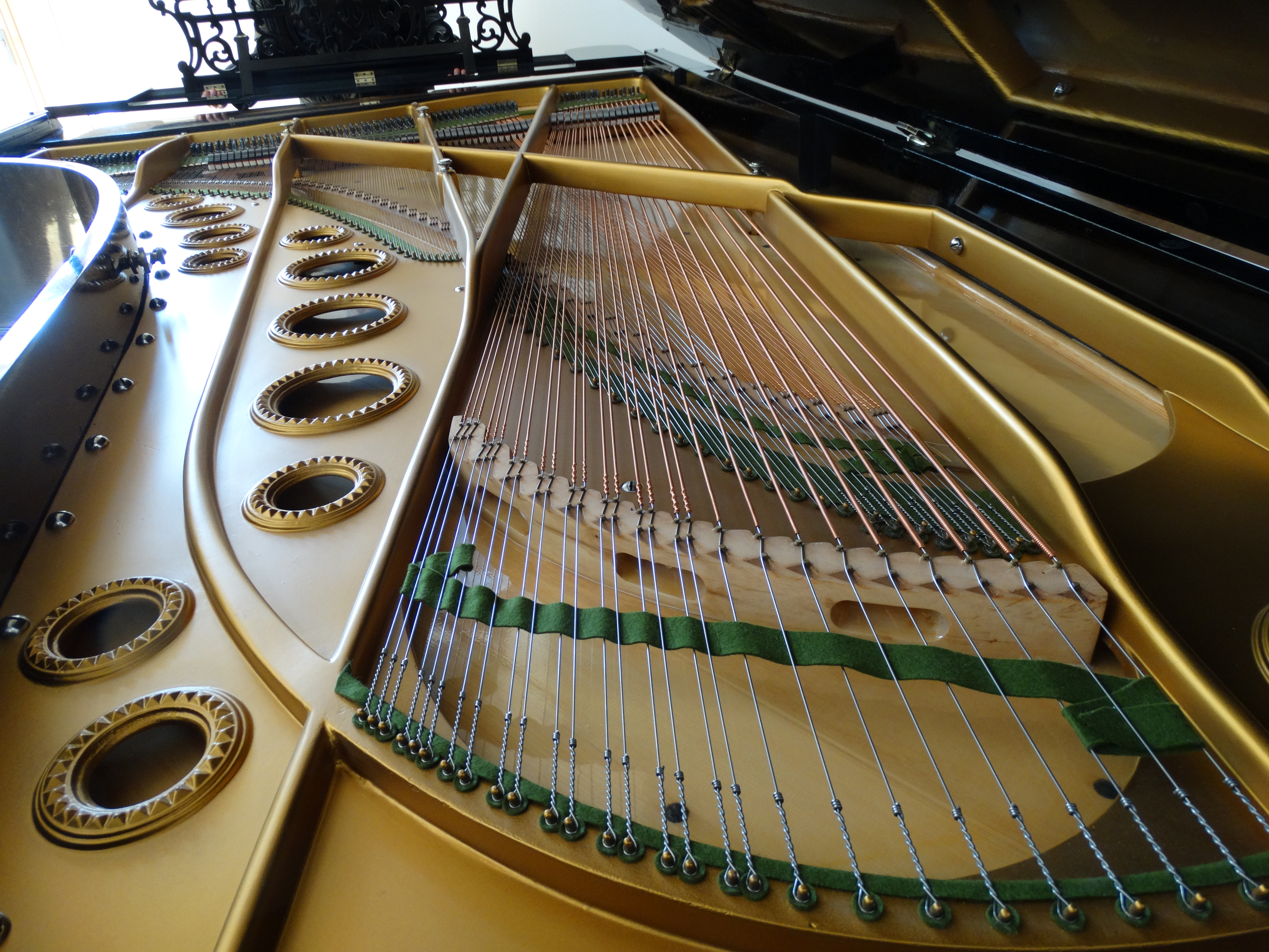 Bechsteinflügel von 1885 - Konzert D-Flügel - restauriert durch Klavier- & Cembalobaumeister Josef Stühlmeyer - Eigentum der Pfarrei Bernhard-Lichtenberg in der Stadt Hof.